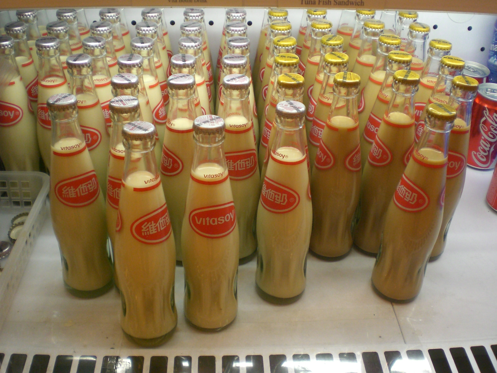 瓶裝維他奶